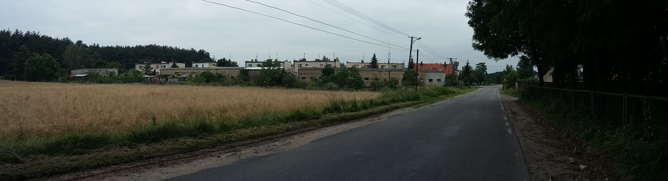 Widok na wieś Buszewo.